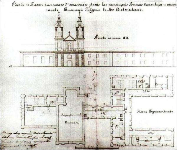 Valkininkų vienuolyno fasadas ir planas, 1839 m.